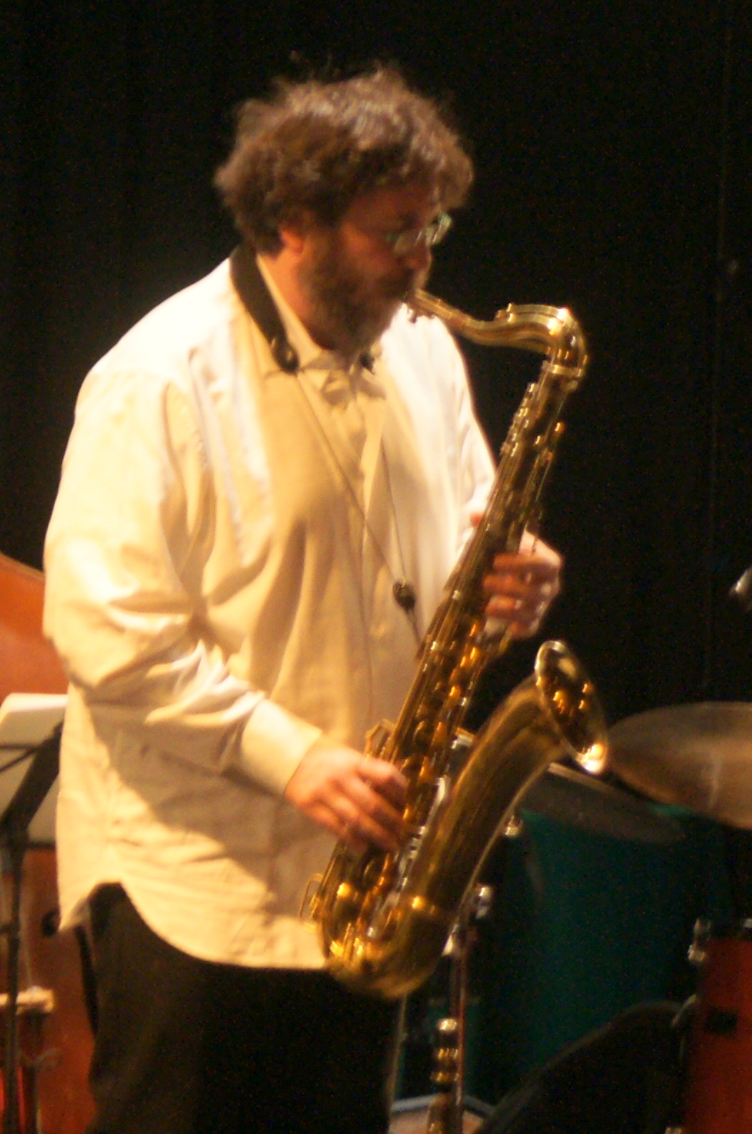 Emanuele Cisi à Nice, 2013